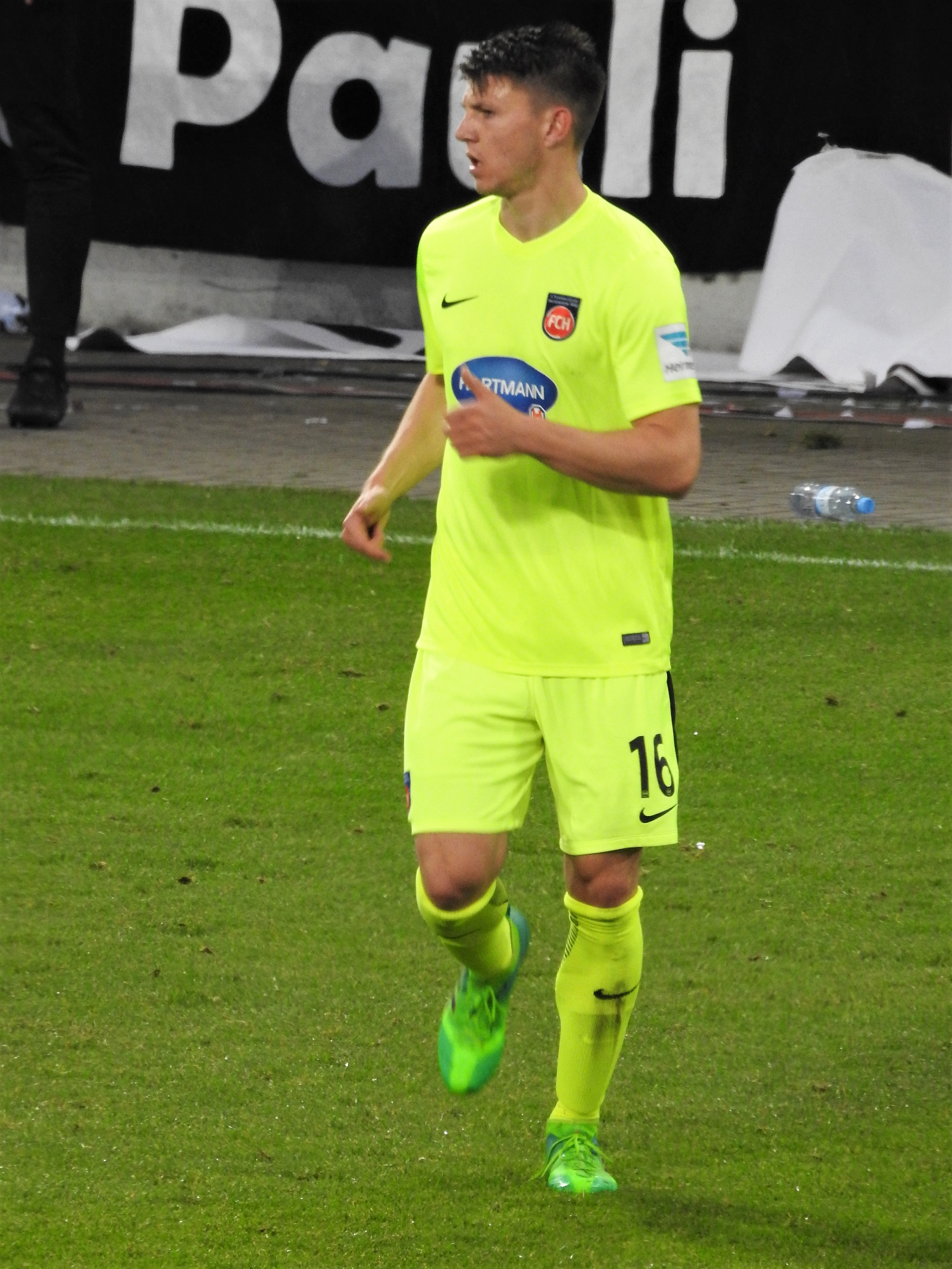 Robin Becker im Trikot von 1.FC Heidenheim